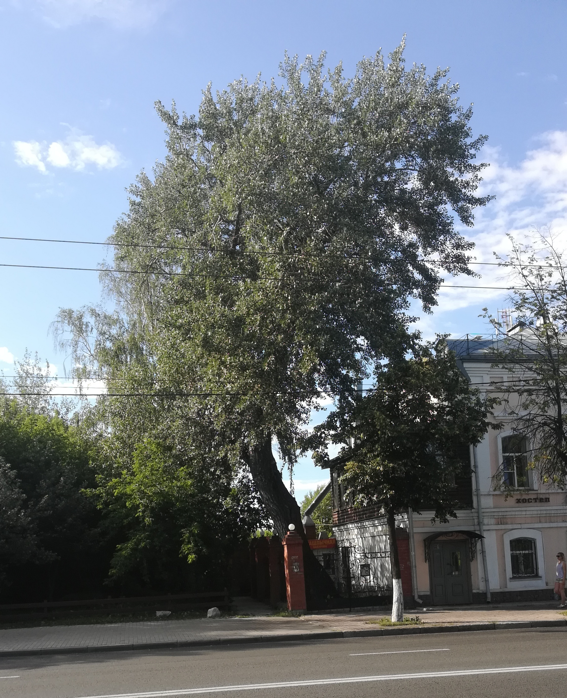 Столетий тополь во Владимире